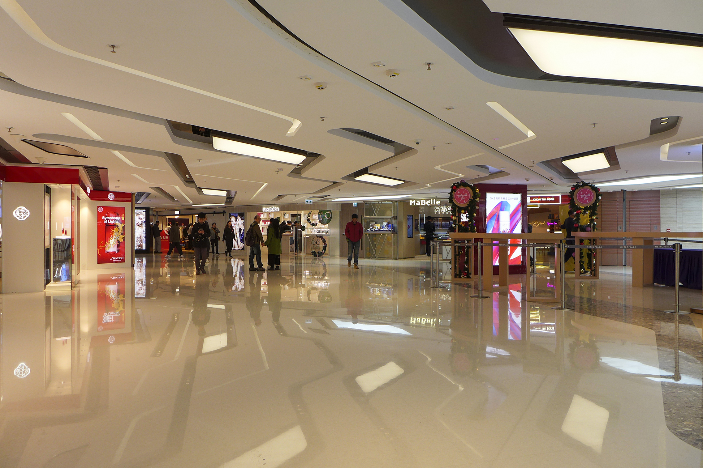 Metroplaza L3 after renovation